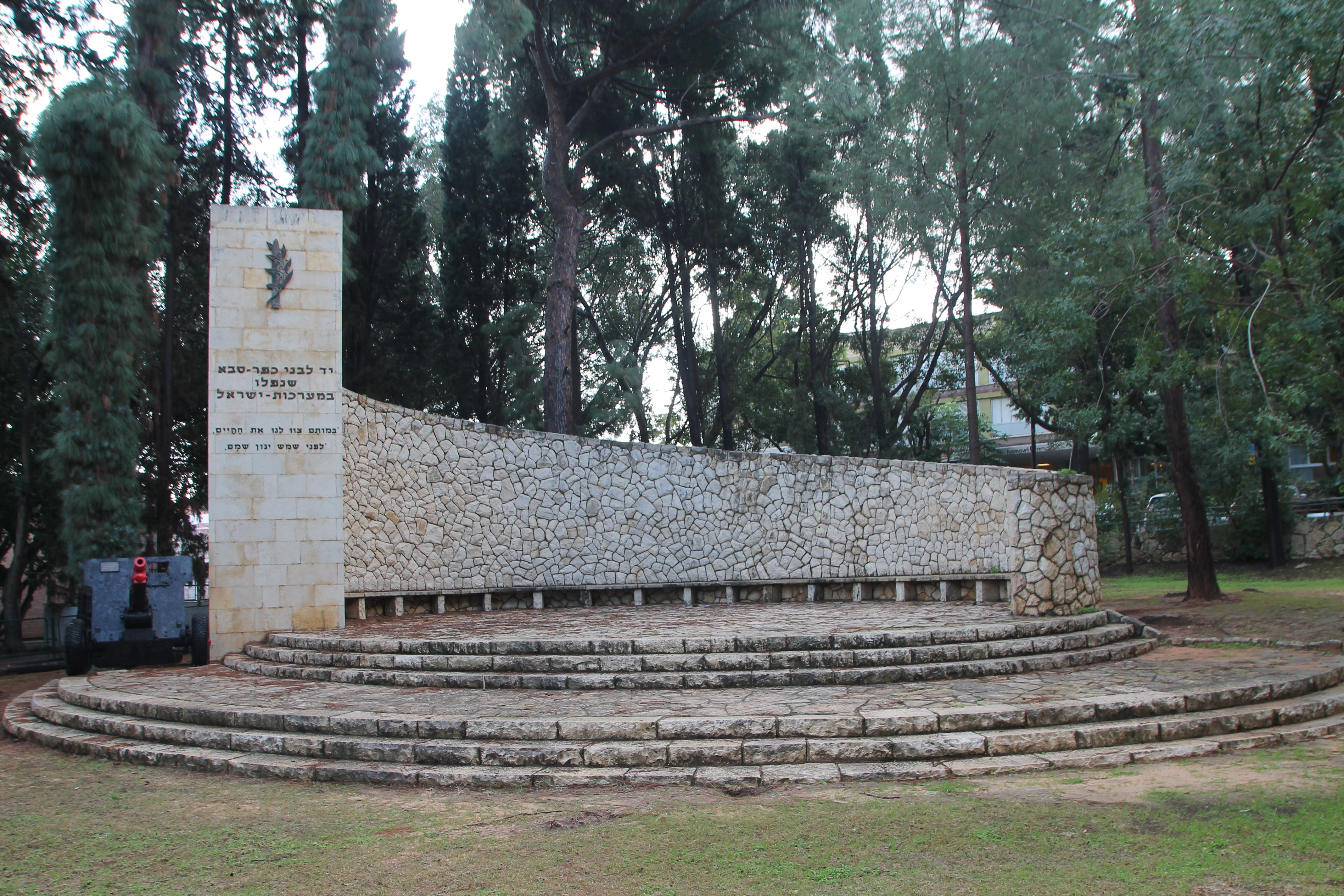 אתר אנדרטת זיכרון לחללי מערכות ישראל